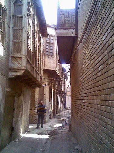 Old Baghdad side streets